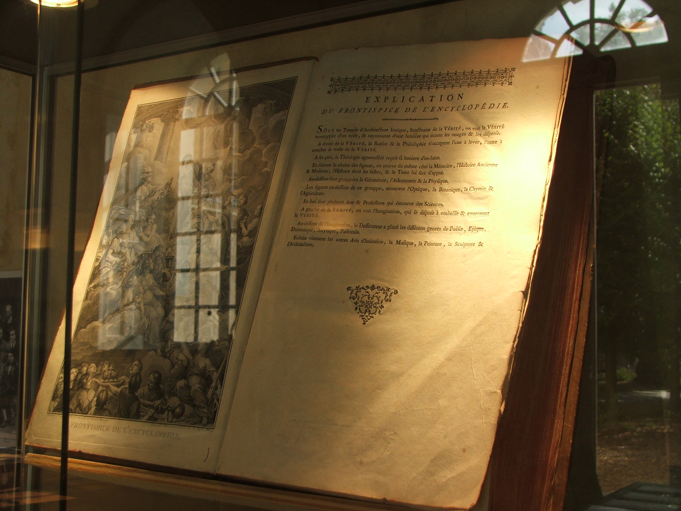 Version de l'encyclopédie de Diderot et d'Alembert conservée dans les fonds anciens du lycée Montesquieu du Mans, ancien collège des Oratoriens.